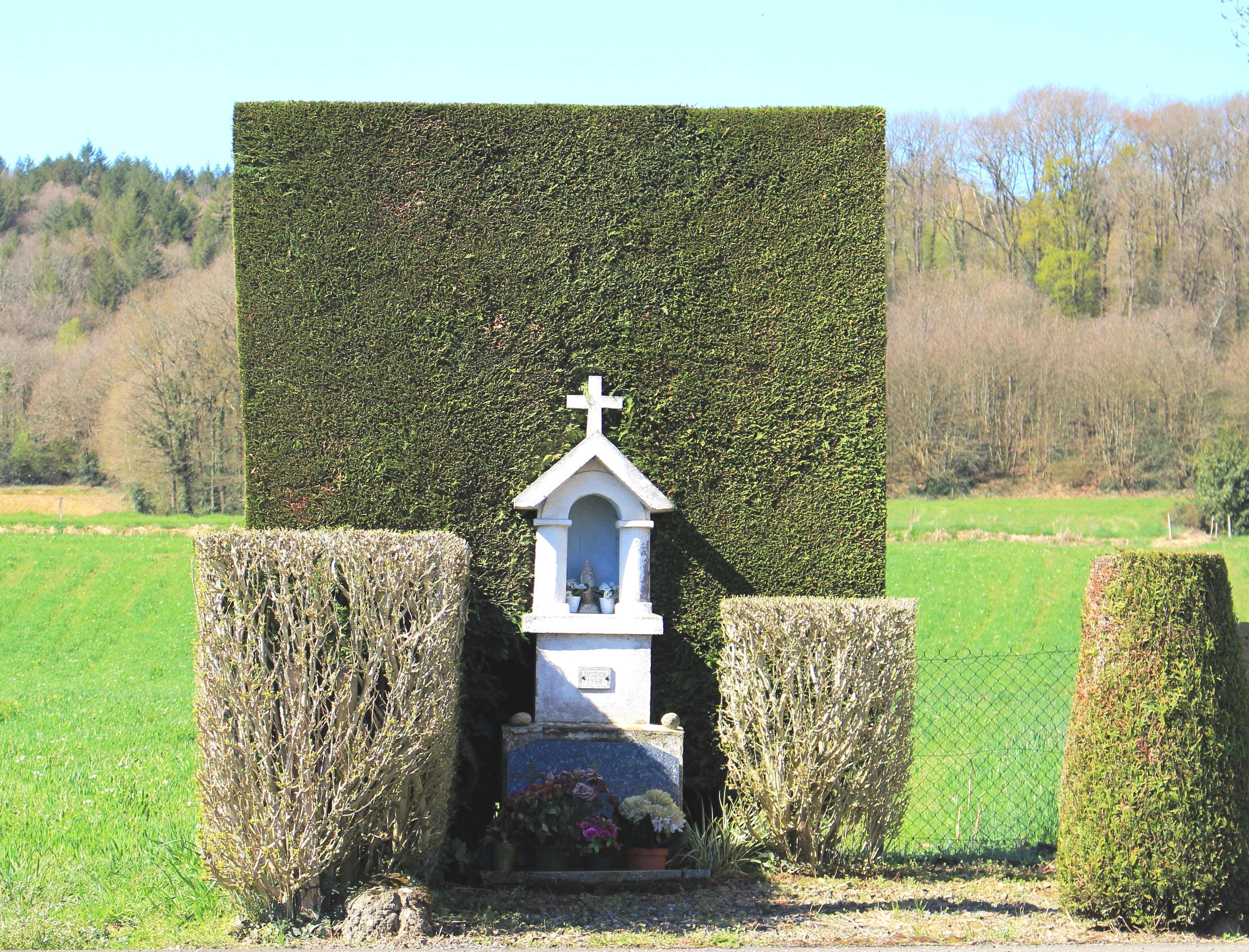 Oratoire de Barlest (Hautes-Pyrénées)